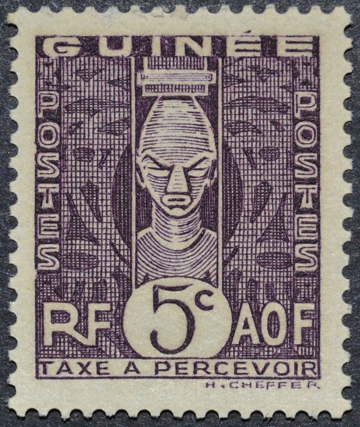 Stamp of French Guinea, tax due, 5c